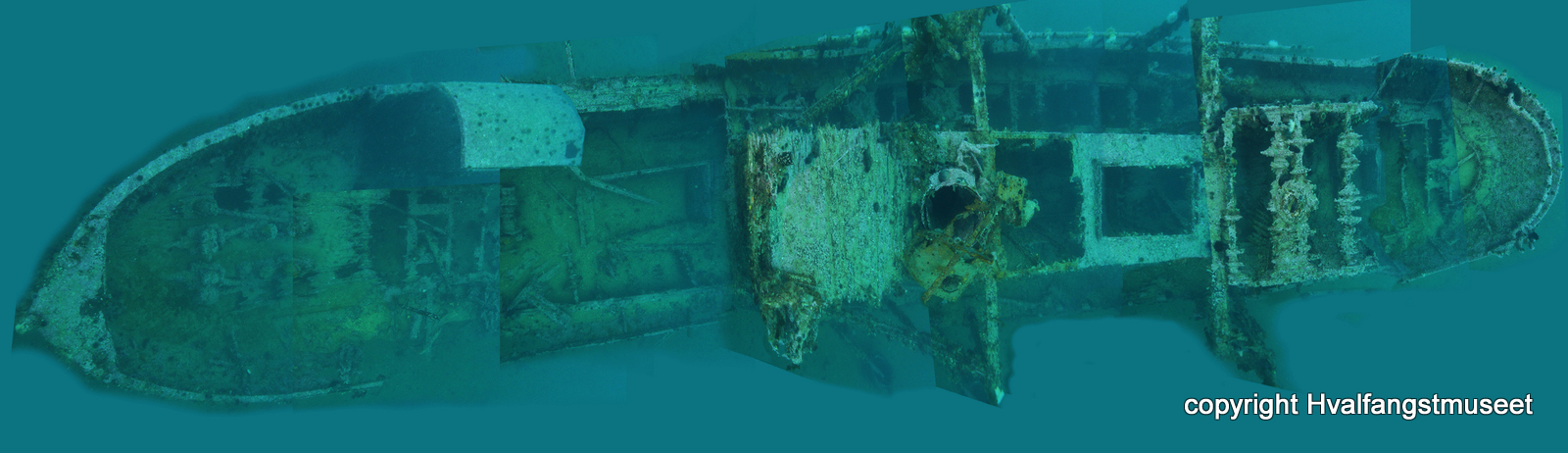 Vraket ble undersøkt og dokumentert i 2015.